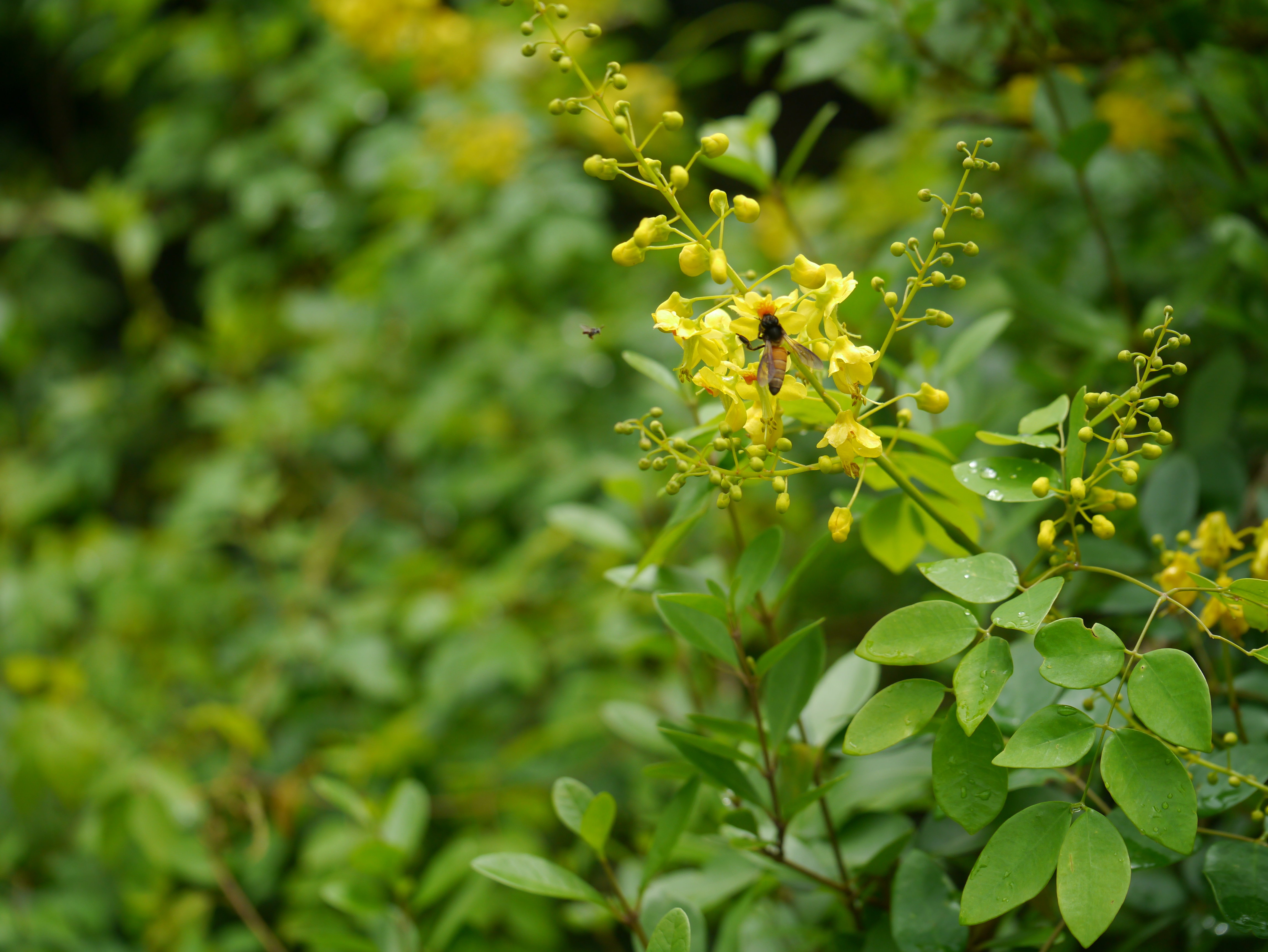 Fabaceae (pea, or legume family) » Caesalpinia crista ses-al-PIN-ee-uh -- named for Andreas Caesalpini, Italian botanist KRIS-ta -- crested commonly known as: crested fever nut • Bengali: নাটাকরঞ্জ natakaranja • Gujarati: ¿ કચકા ? kachka • Hindi: कटकरंज katkaranja • Kannada: ಕಿರಿಗೆಜ್ಜುಗ kiri-gejjuga • Konkani: वाकेरी vakeri • Malayalam: കഴഞ്ച് kazhanchi • Marathi: बनकरेटी ban-kareti, ¿ कांचकी ? kanchaki, सागर लता sagar lata • Oriya: gilo, nentei • Sanskrit: कण्टकि करञ्जा kantaki karanja, कुबेरक्षी kuberakshi, लता करञ्ज lata karanja, विटप करञ्ज vitapa karanja • Tamil: முட்கொன்றை mut-konrai • Telugu: ముల్లుతీగె mullutige Native of: e Asia, India, Sri Lanka, Indo-China, Malesia, n Australia, Pacific References: Flowers of India • Flora Cafe • Wild Singapore • NPGS / GRIN • ENVIS - FRLHT • DDSA